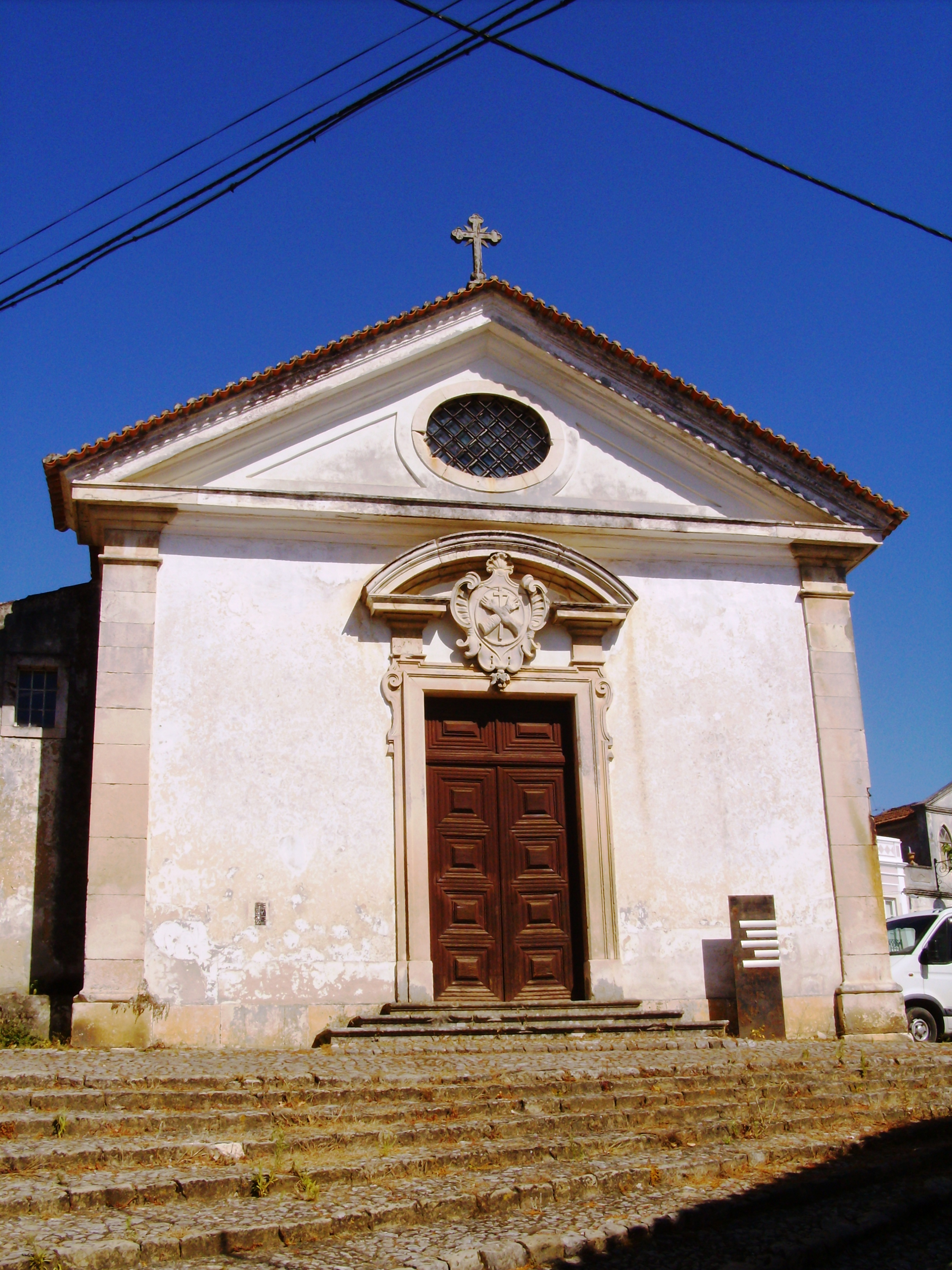 Igreja do Espírito Santo, Caldas da Rainha, Distrito de Leiria, Portugal.